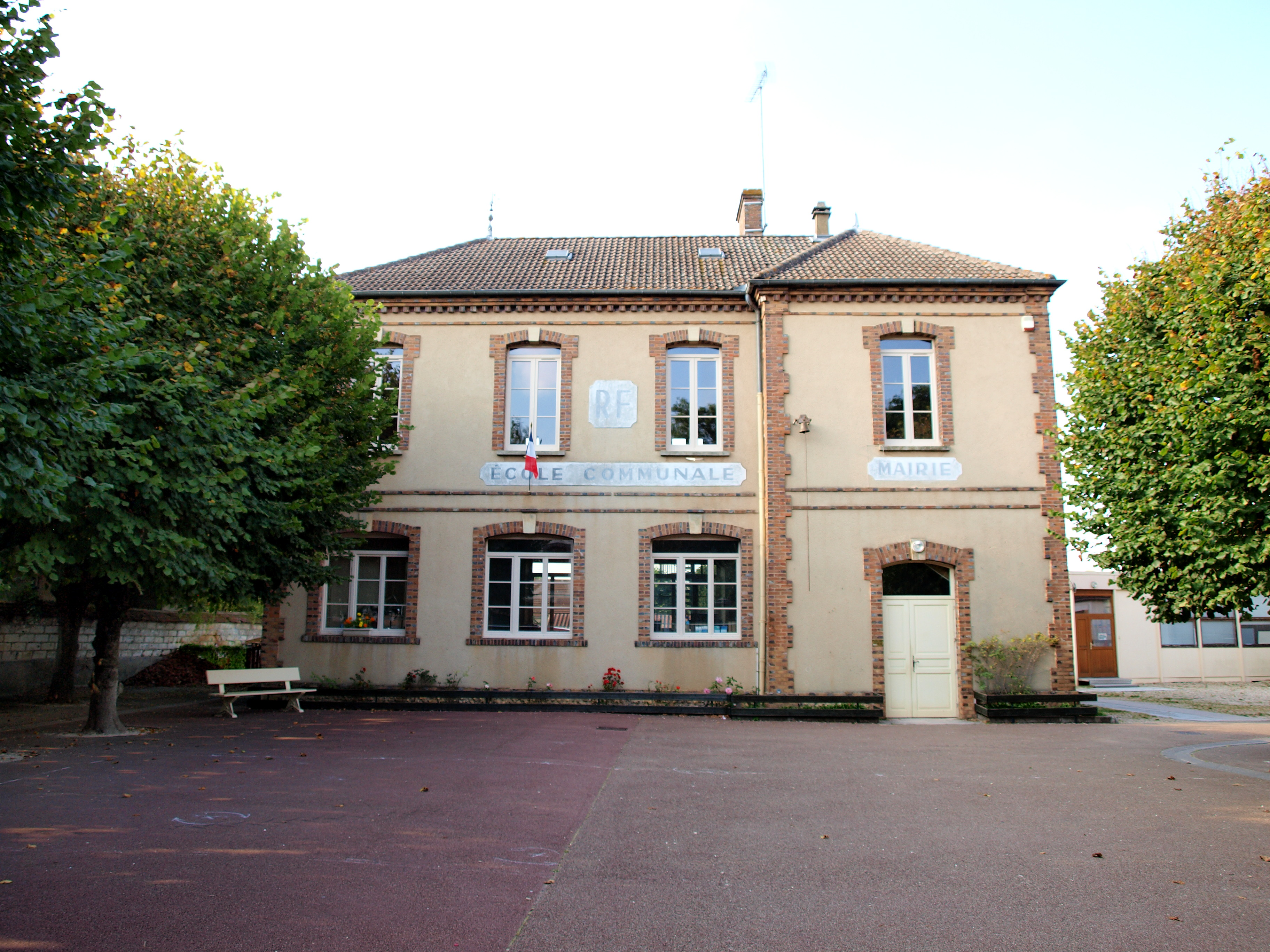 Theil-sur-Vanne (Yonne, France) ; mairie-école